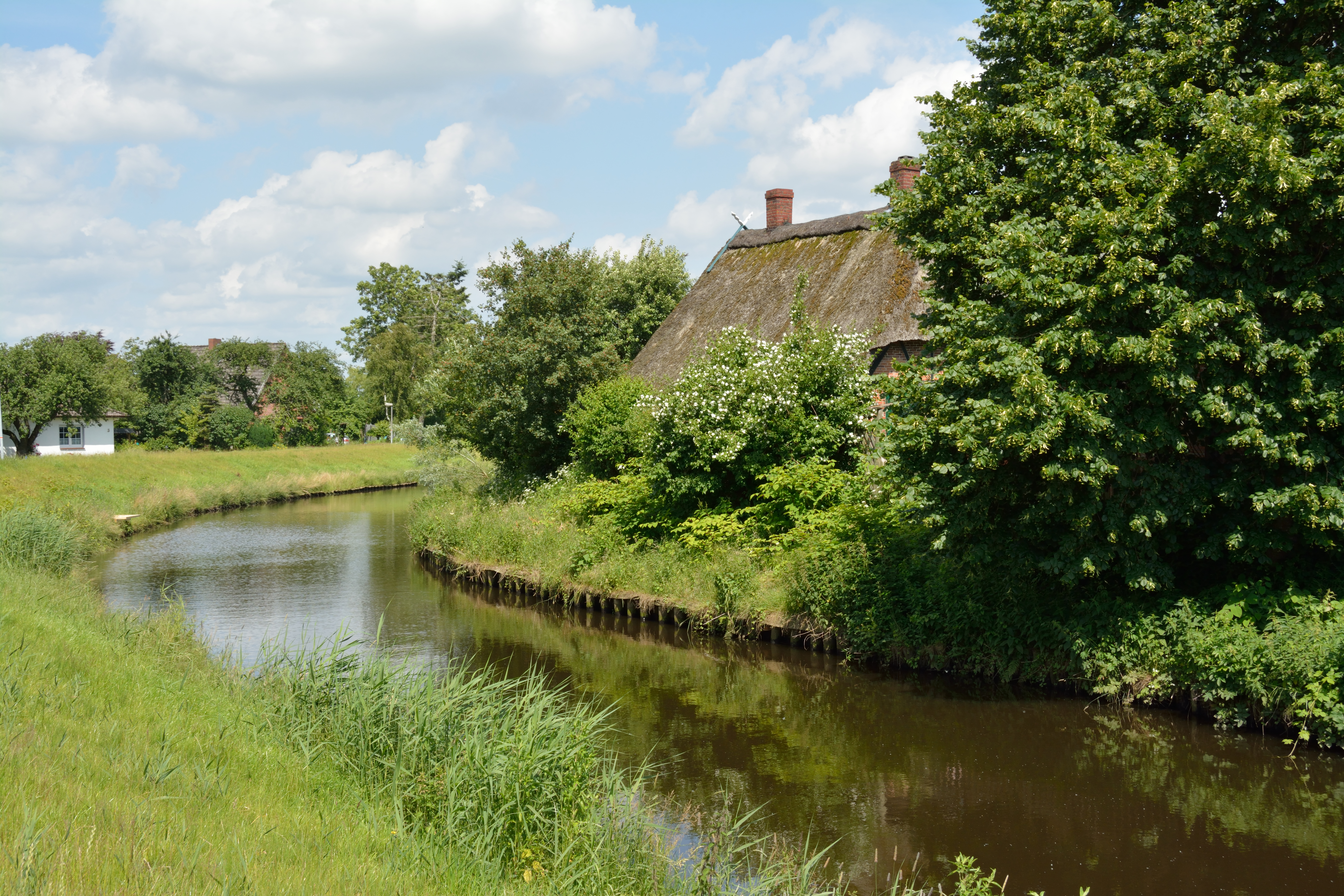 Die Bekau in Brekdorf